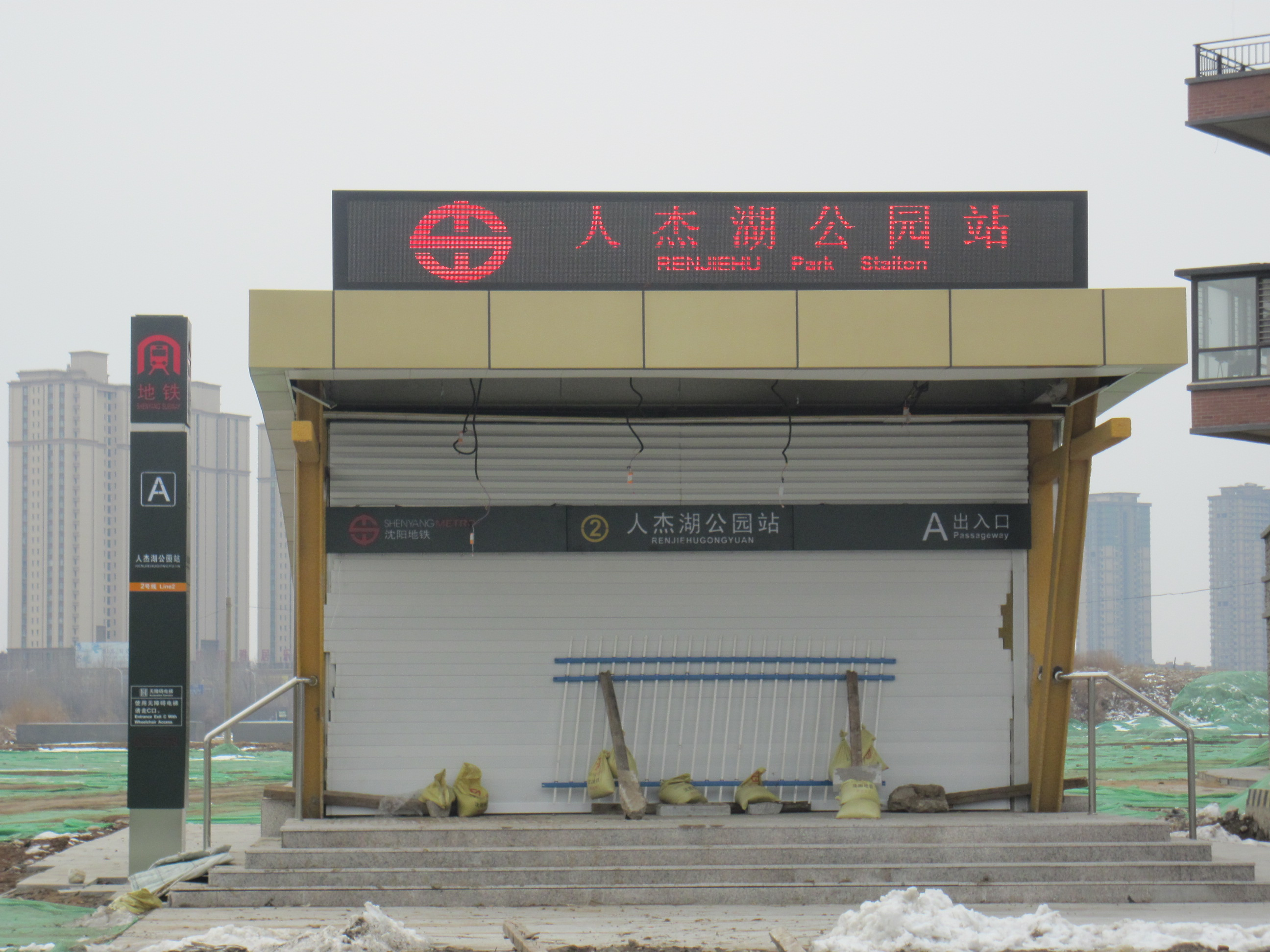 中文（中国大陆）: 人杰湖公园站A出入口，上方的屏幕显示已改为英语的“Ren Jie Hu Park”。